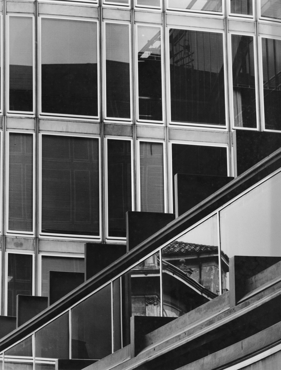 Direzione Generale RAI Viale Mazzini, Roma Foto Gianni Berengo Gardin